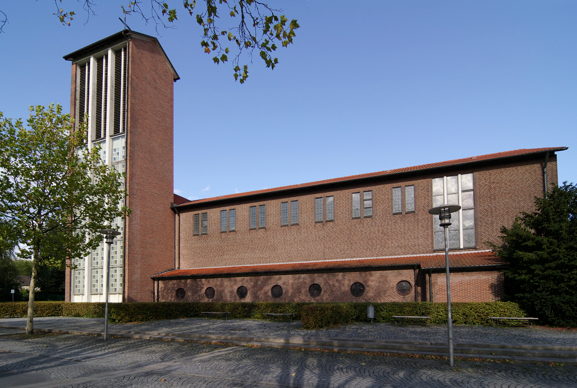 St. Elisabeth in Bergkamen-Mitte, Nordrhein-Westfalen, Deutschland